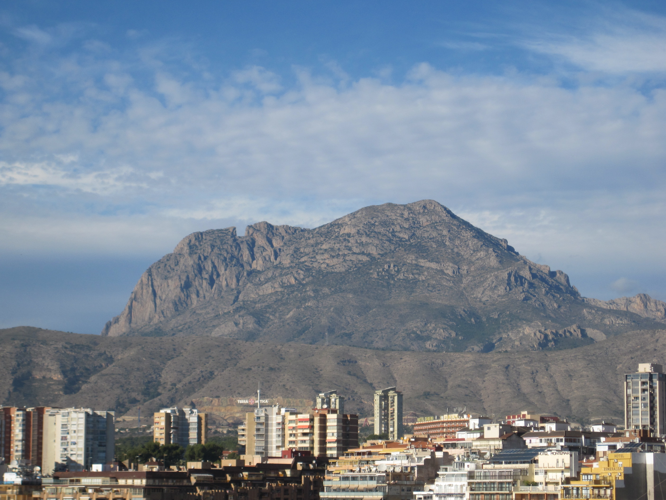 Vista del Puig Campana desde Benidorm (Alicante, España).